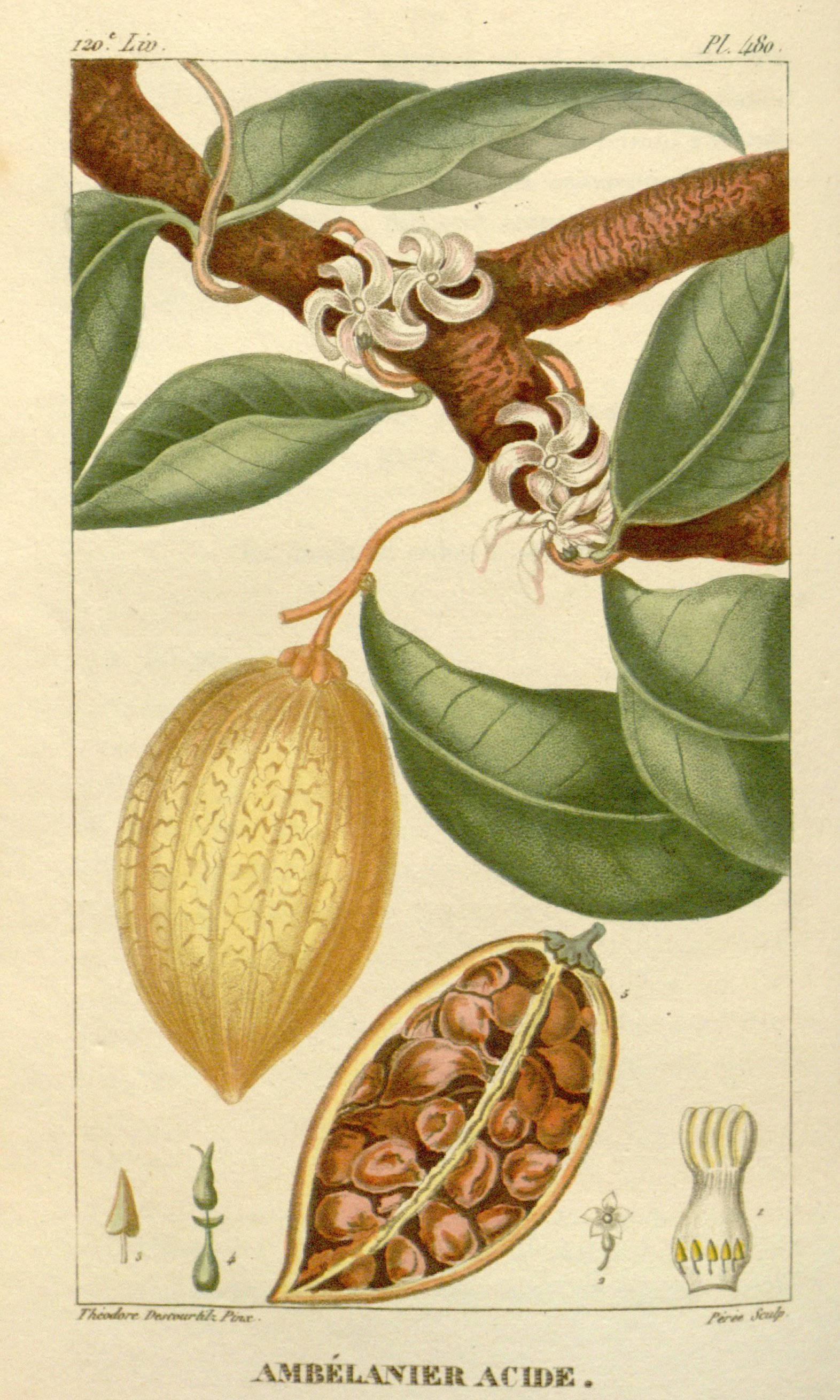 Ambelania acida Aublet en Descourtilz, J.T. & Descourtilz, M.E., Flore médicale des Antilles, vol. 7, t. 480, 1829 - 1: Corola abierta con los estambres; 2: Cáliz; 3: Estambre; 4: Pístilo; 5: Cápsula: corte longitudinal con el tábique y las semillas in situ.